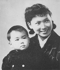 幼少時代 栴檀は双葉より芳し…？